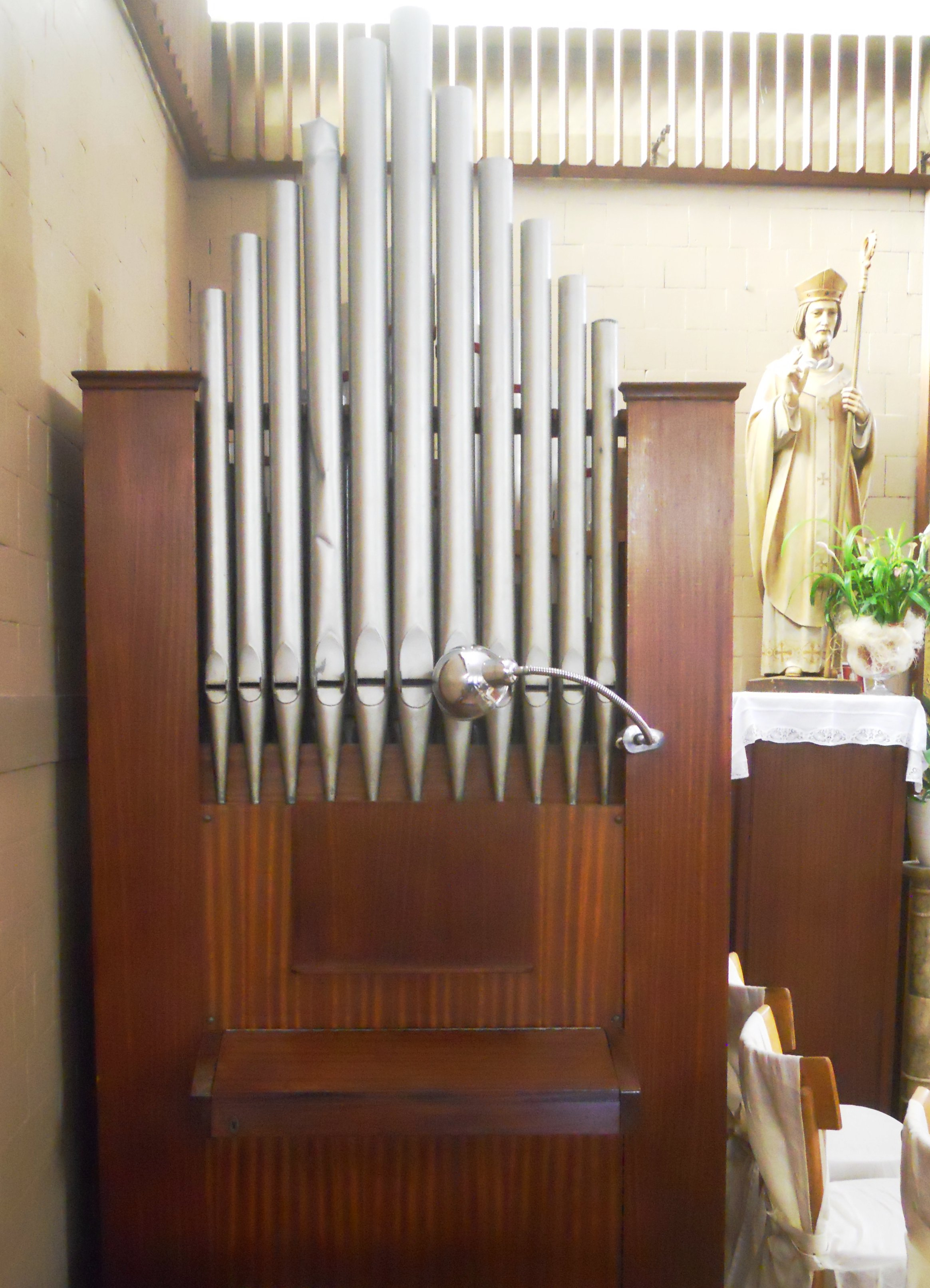 L'organo a canne Chichi della chiesa di Sant'Eligio a Villaggio Prenestino.